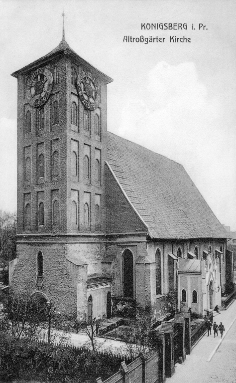 Altrossgärtner Kirche in Königsberg